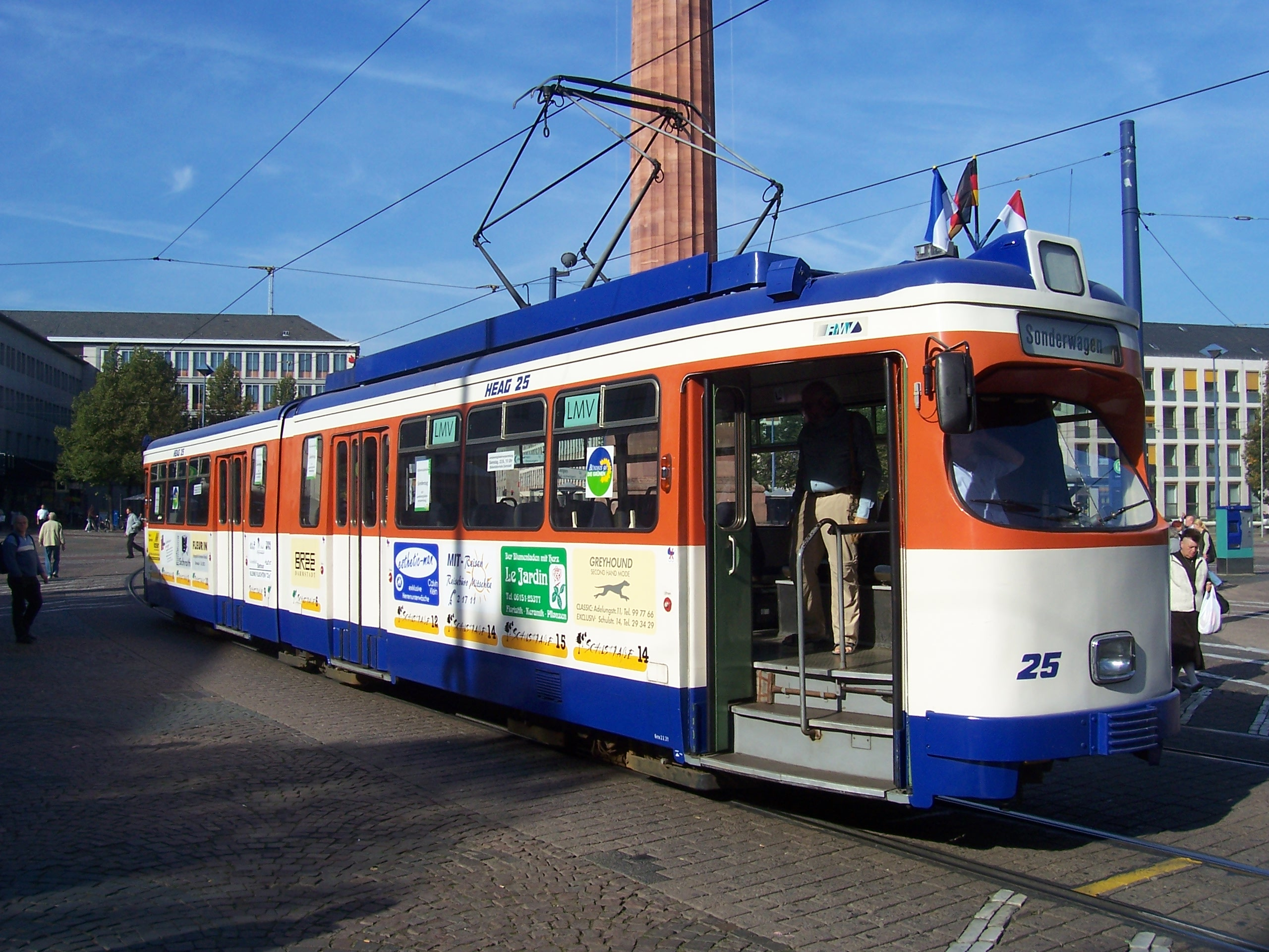 Wagen 25 der Darmstädter Straßenbahn auf einer Sonderfahrt am Luisenplatz.